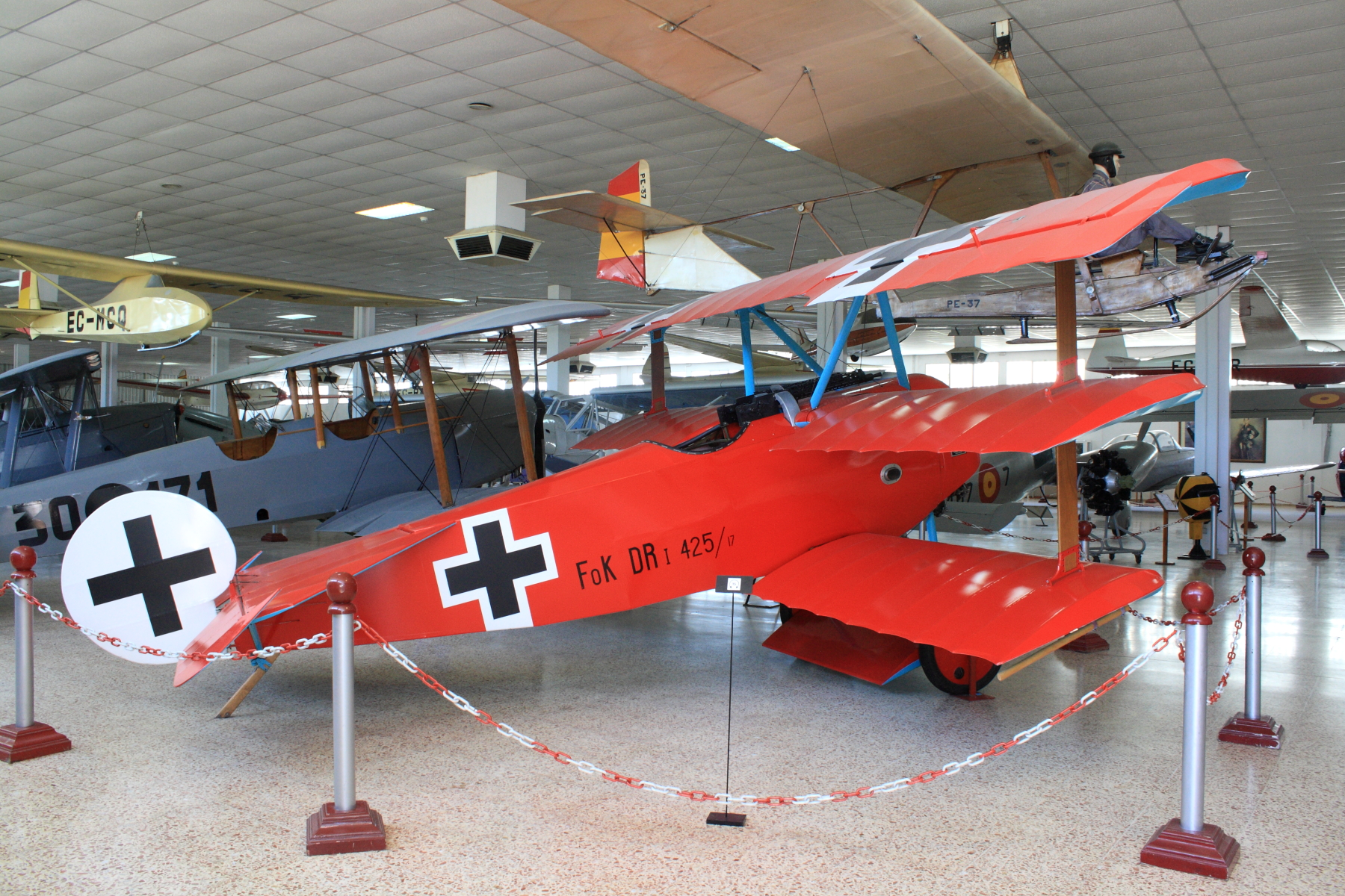 Fokker Dr.I, réplica del usado por el legendario Manfred von Richthofen (Barón Rojo) durante la Primera Guerra Mundial. Museo de Aeronáutica y Astronáutica de España (Museo del Aire), Madrid, Comunidad de Madrid, España